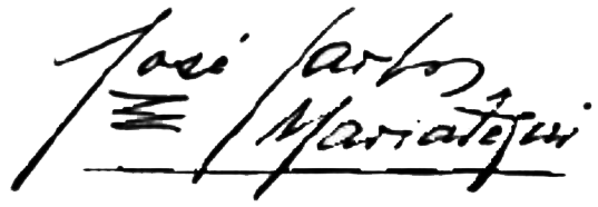 Firma de José Carlos Mariátegui.